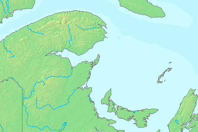 Carte du Golfe du Saint-Laurent, tirée de File:Map of Gulf of Saint Lawrence-No names.png.